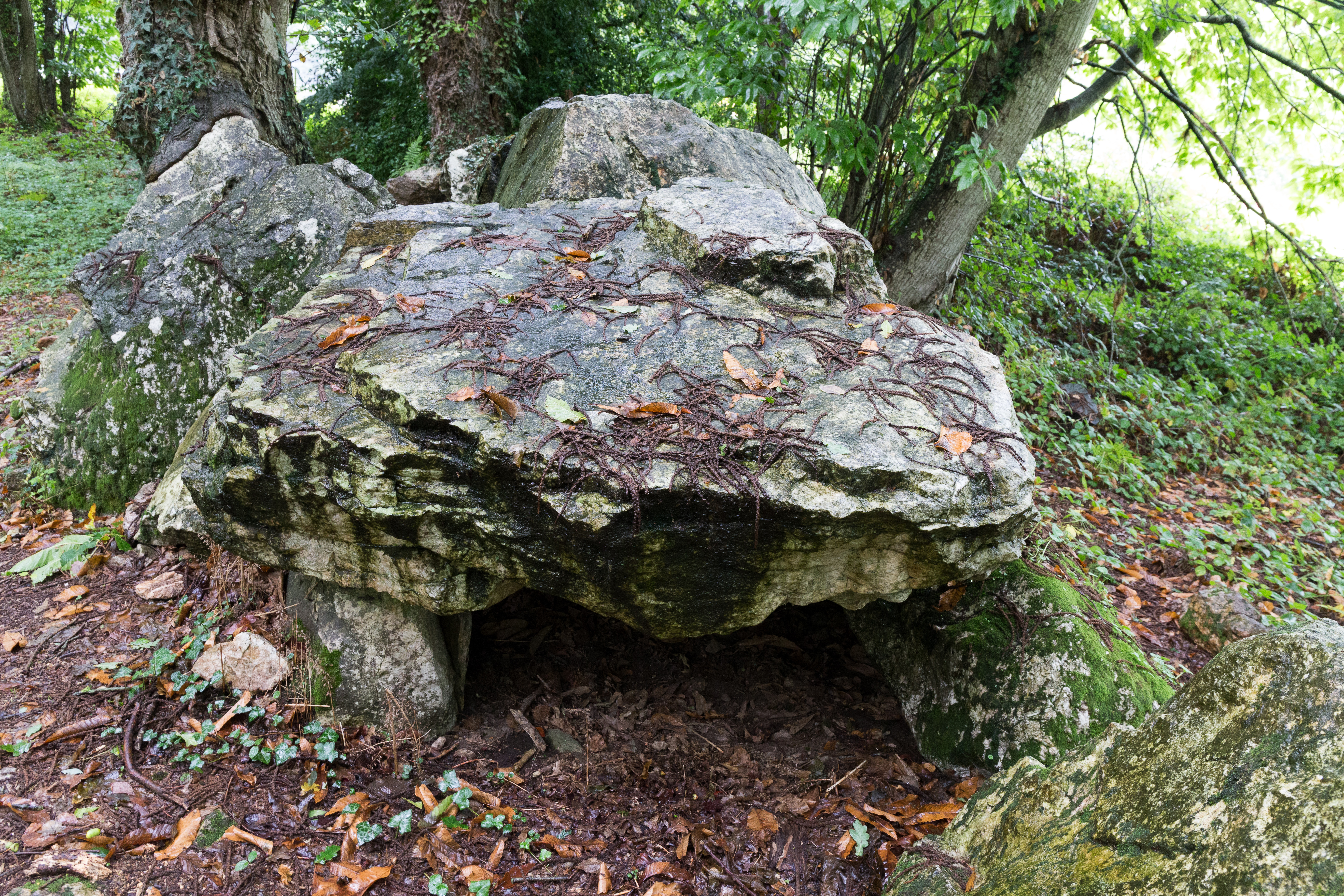 Allée couverte de Bel Evan à Plouër-sur-Rance.